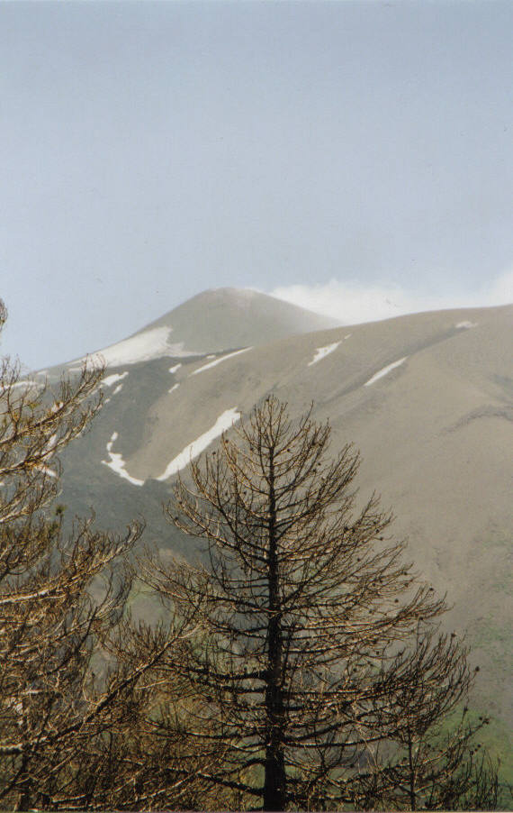 Descripción:Crater principal del Monte Etna, tomada desde Instituto Vulcanológico.21-0604 Autor:Joseparez Estatus Copyright:Uso Libre